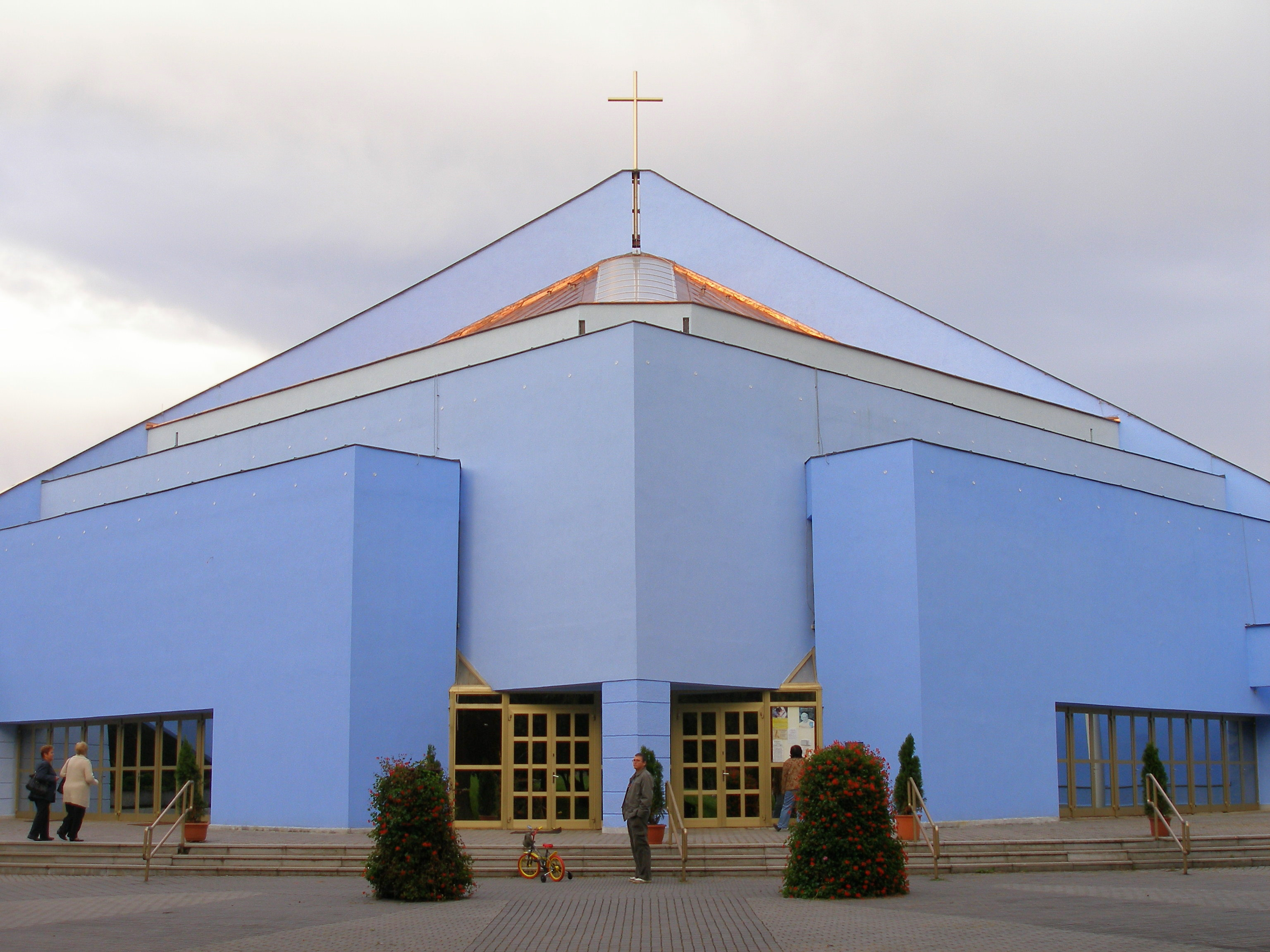 Kostol Kráľovnej Pokoja na Námestí Kráľovnej Pokoja, sídlisko III mesto Prešov.